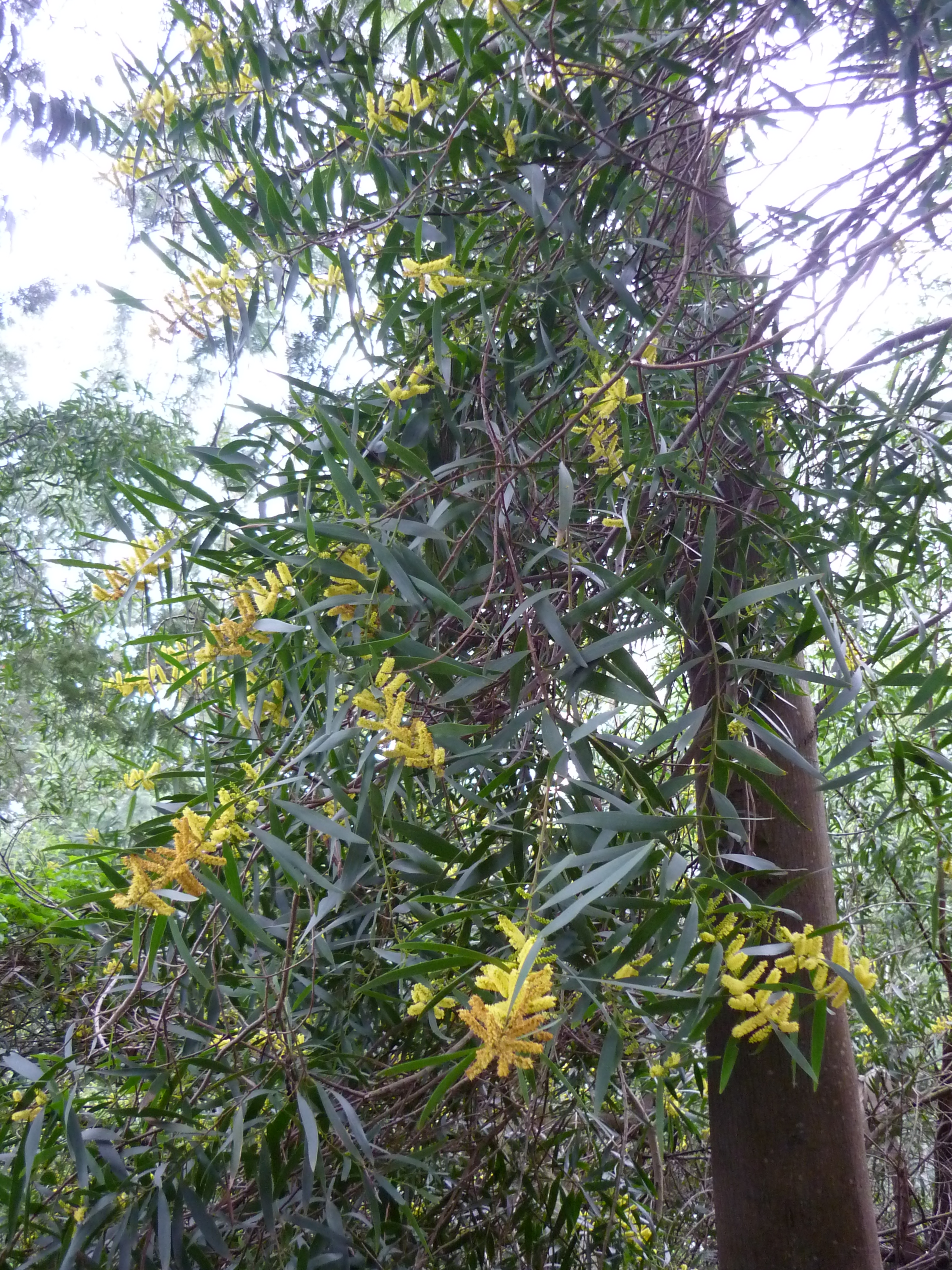 Golyós eukaliptusz (Eucalyptus globulus) virágja (Funchal, Madeira)